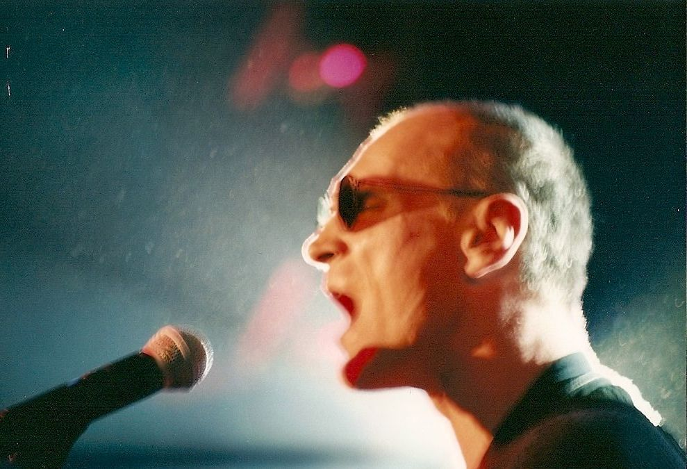 Lech Janerka, Stodoła, Flota zjednoczonych sił